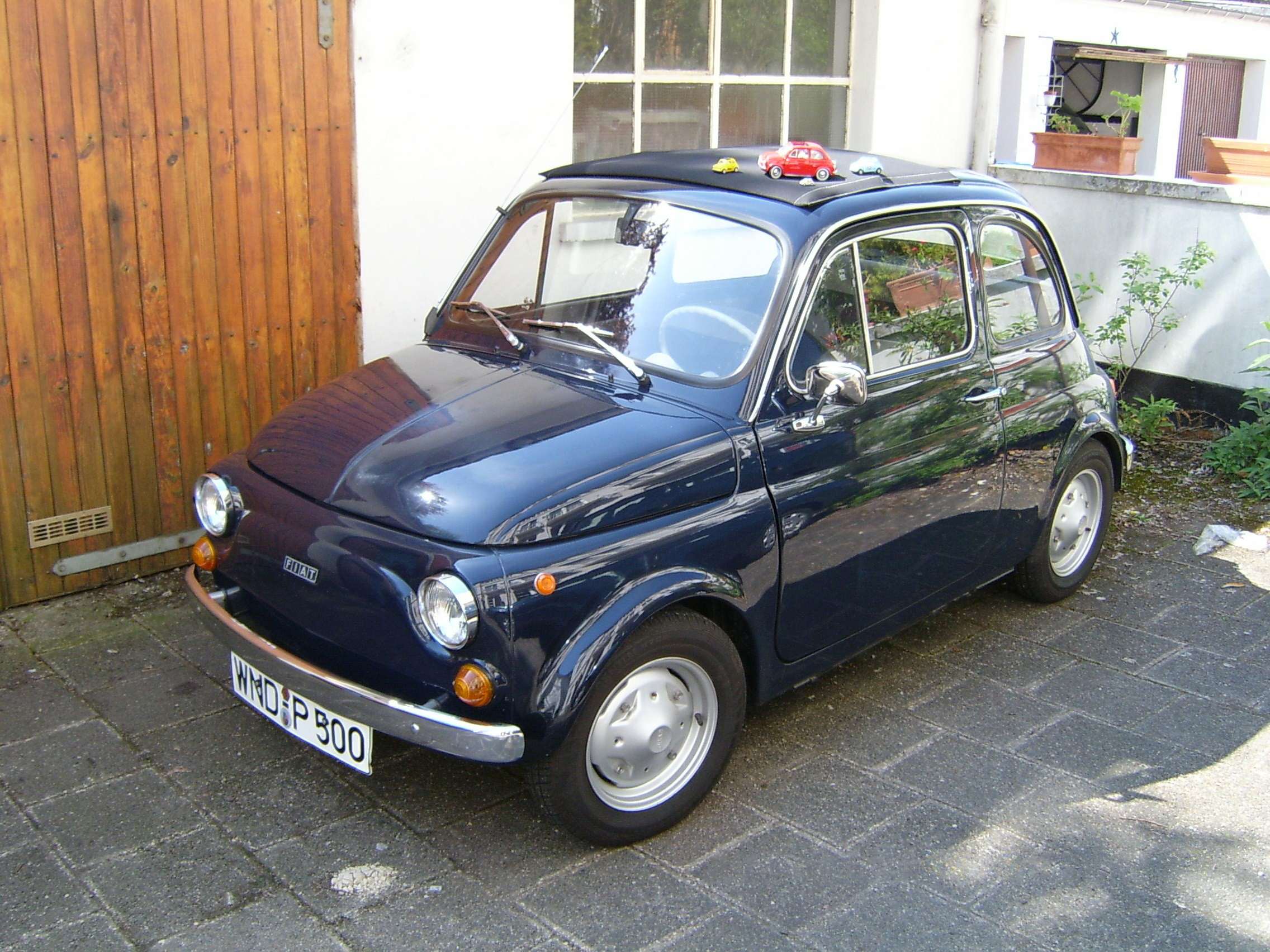 Fiat 500, Baujahr 1970